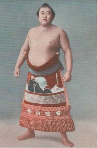 Sumo wrestler Hitachiiwa Eitarō (1900-1957)